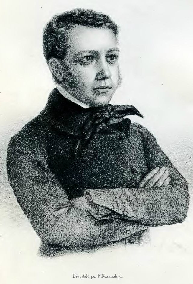 Retrato de Juan Mackenna O'Reilly en "Vida del jeneral D. Juan Mackenna" de Benjamín Vicuña Mackenna. Imprenta del Ferrocarril, año 1856.